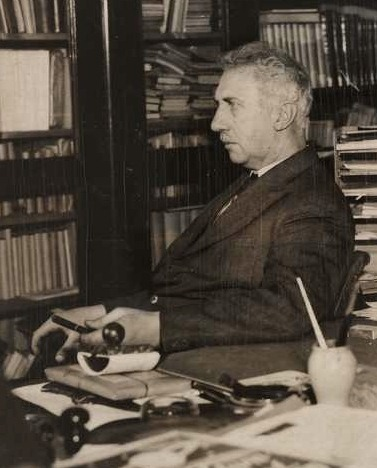 interiør, kontor, portrett, mann, overlærer ved Lilleborg skole, sittende halvfigur ved skrivebord, profil.